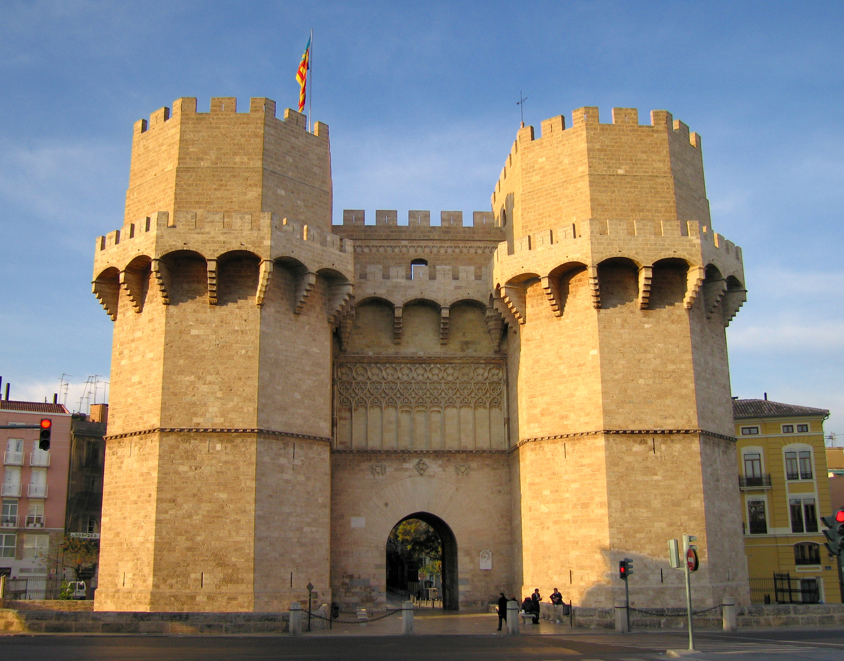 Torres de Serrans (València)